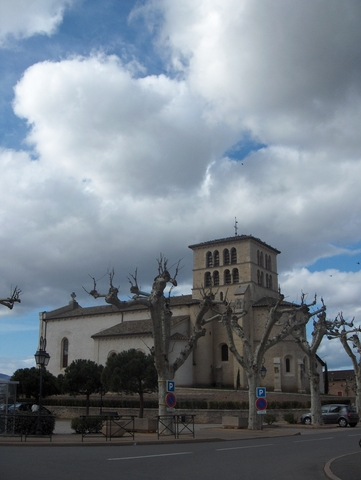 Eglise de St-Georges de Reneins